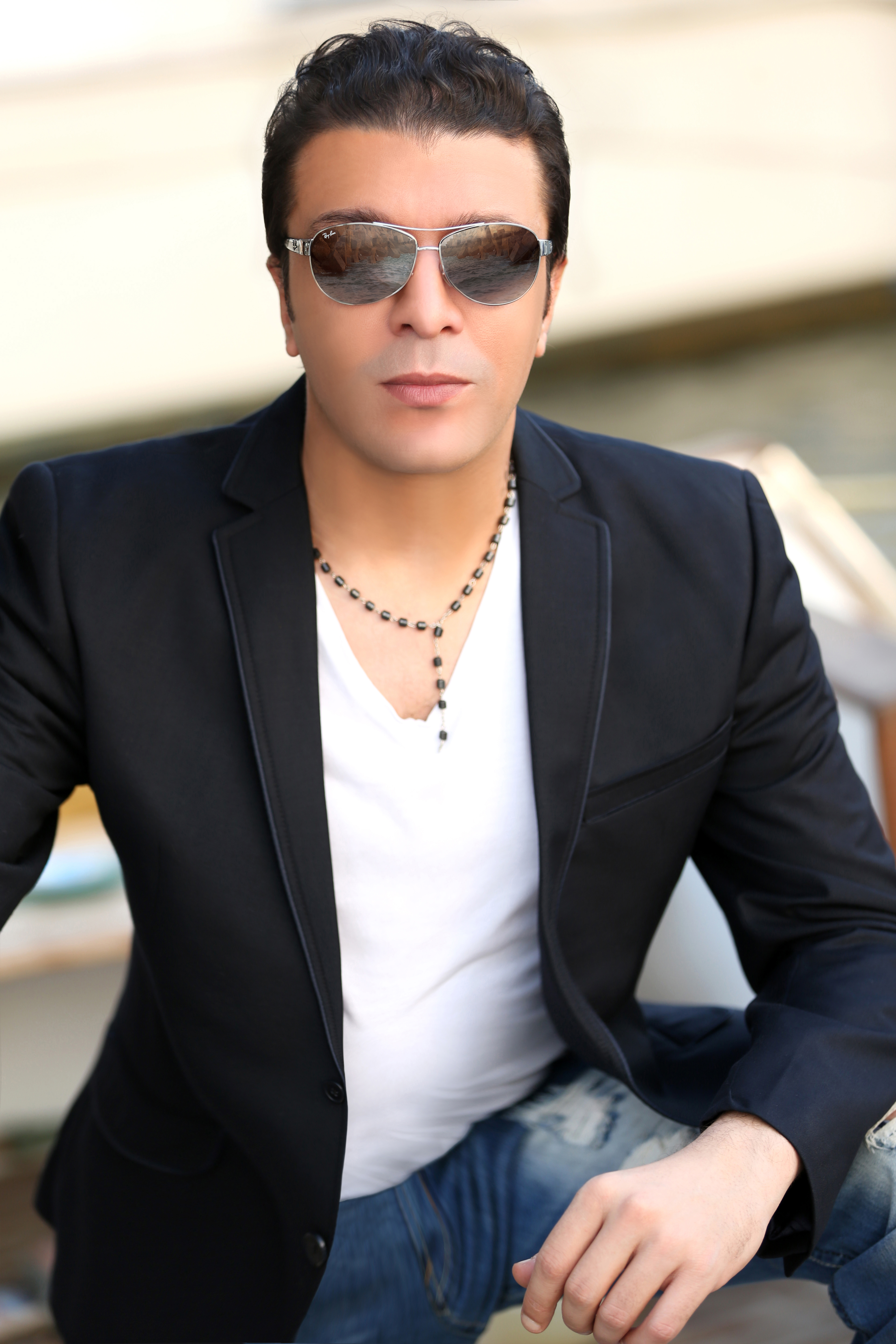 صورة من البوم الفنان مصطفى كامل وسط الدنيا الخاينة